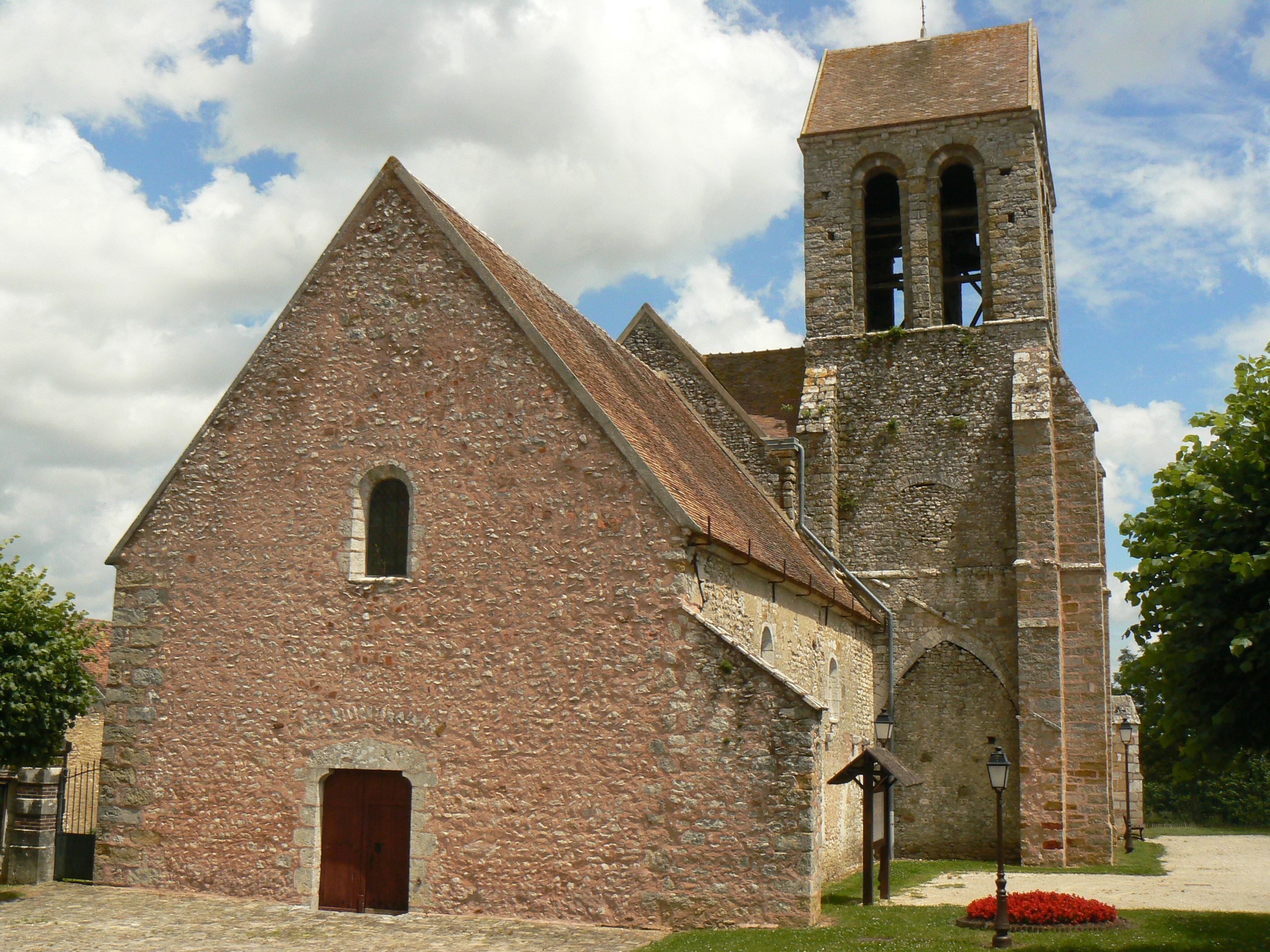 Eglise de Savins en Seine-et-Marne (France)